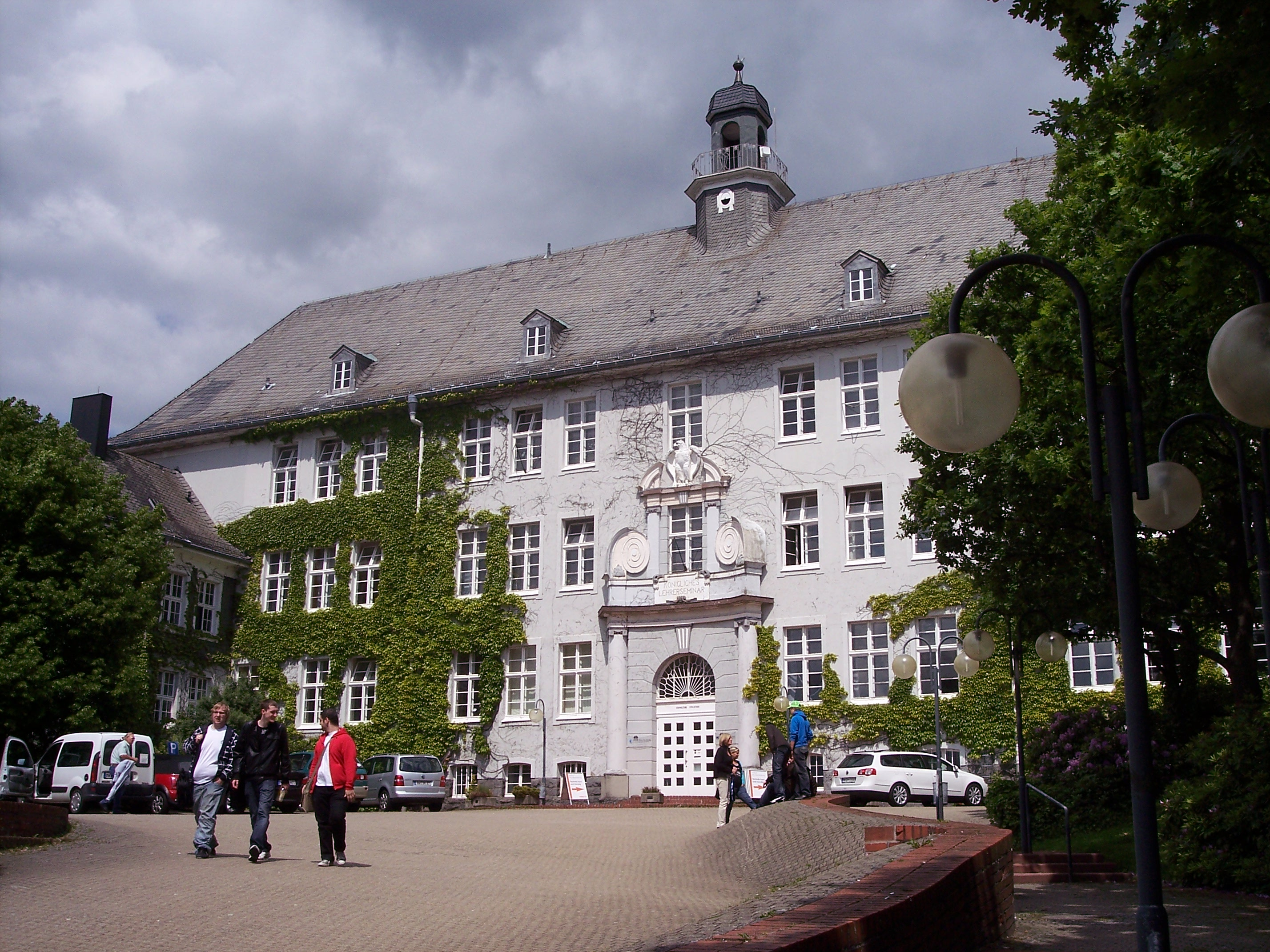 Lüdenscheid, Berufsschule Buckesfeld, Altbau (ehem. preuß. Lehrerseminar)